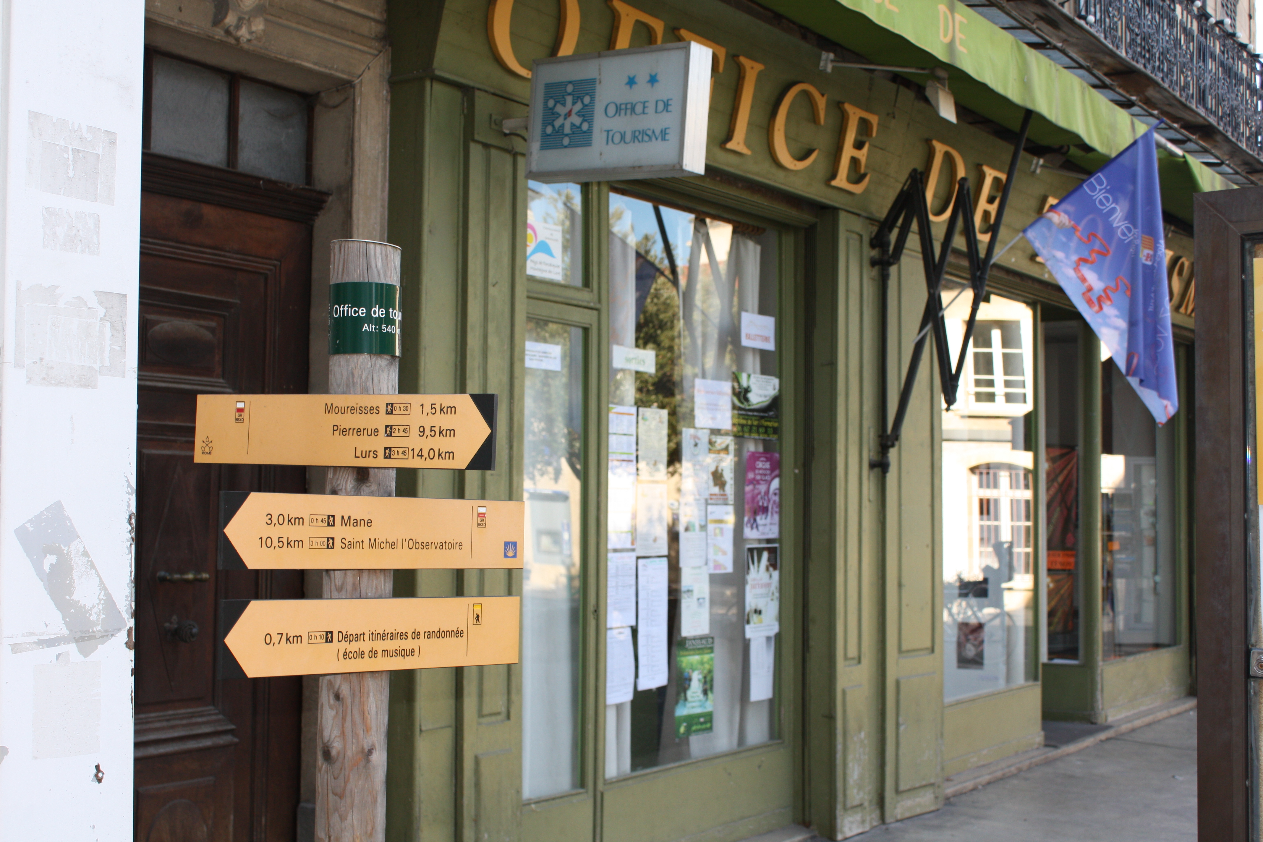 Office de tourisme de Forcalquier et balisages des randonnées